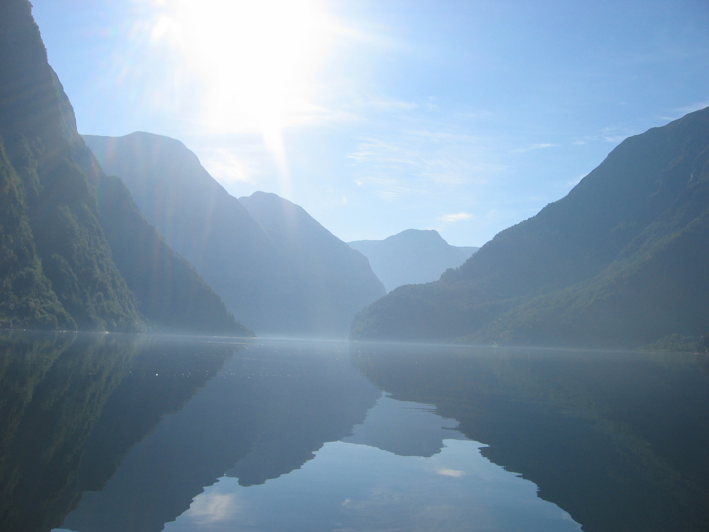 Nærøyfjorden in Norway